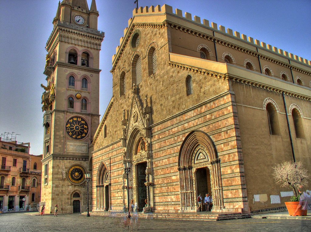 Il Duomo di Messina, dedicato a Maria Assunta, è la Basilica Cattedrale Protometropolitana dell'Arcidiocesi di Messina - Lipari - Santa Lucia del Mela. Sorge in pieno centro storico di Messina, dove prospetta con la facciata ed il campanile sull'ampia Piazza del Duomo. (immagine HDR)Duomo di Messina